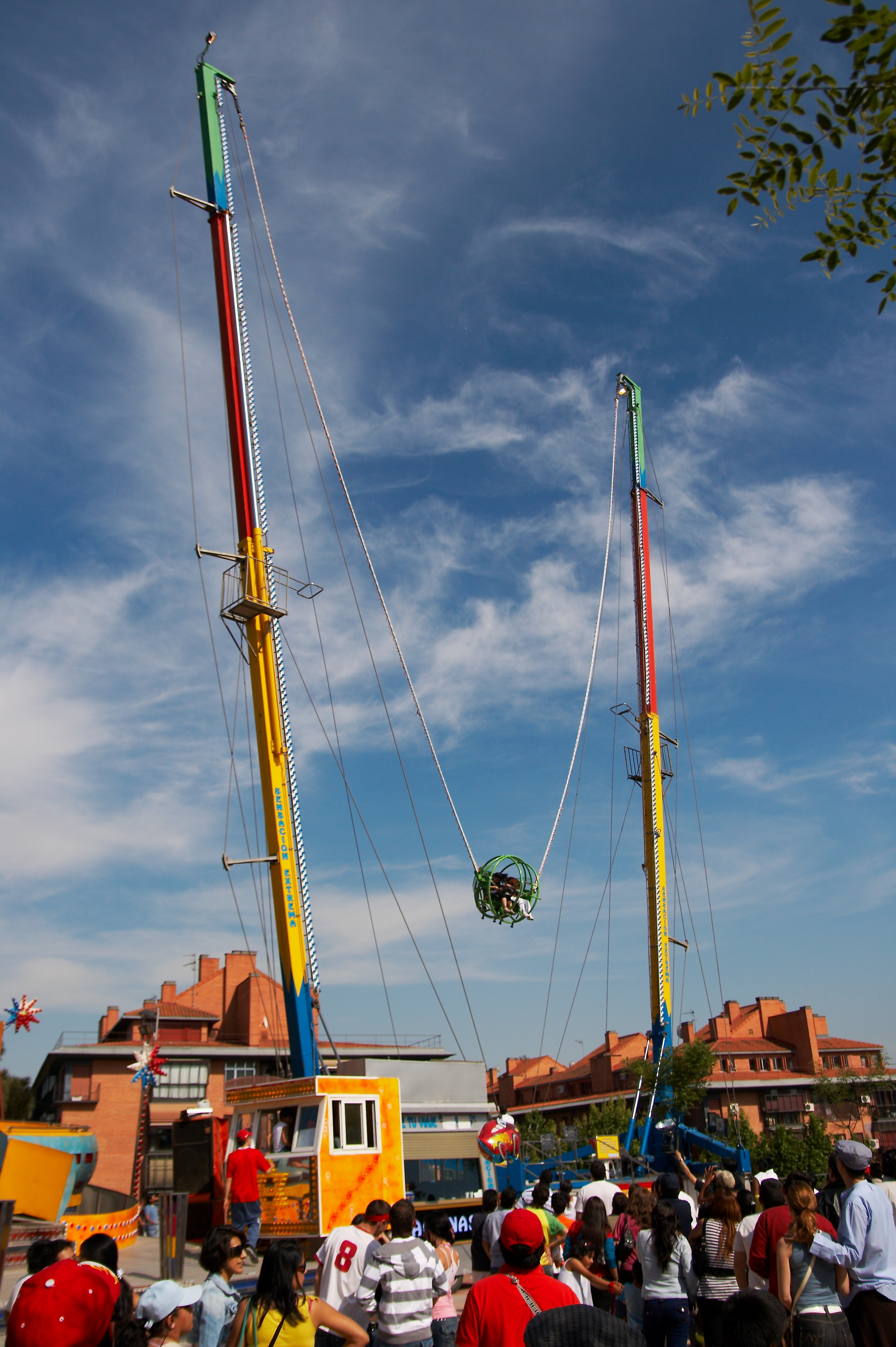 Parque de atracciones. Fiestas de San Isidro 2007, Madrid, España.